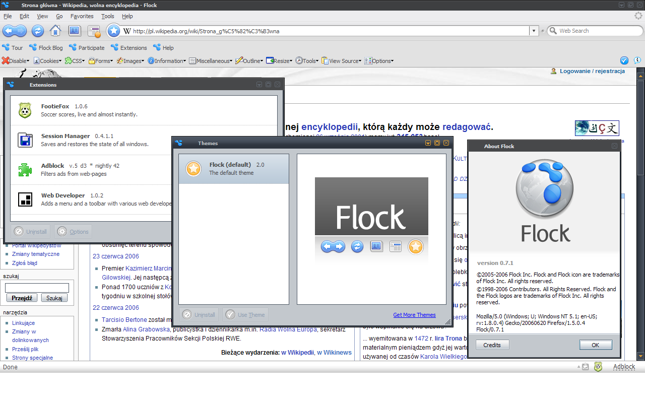 Zrzut ekranu przeglądarki Flock w wersji 0.7.1.